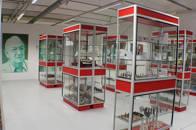 Blick in das Schachmuseum